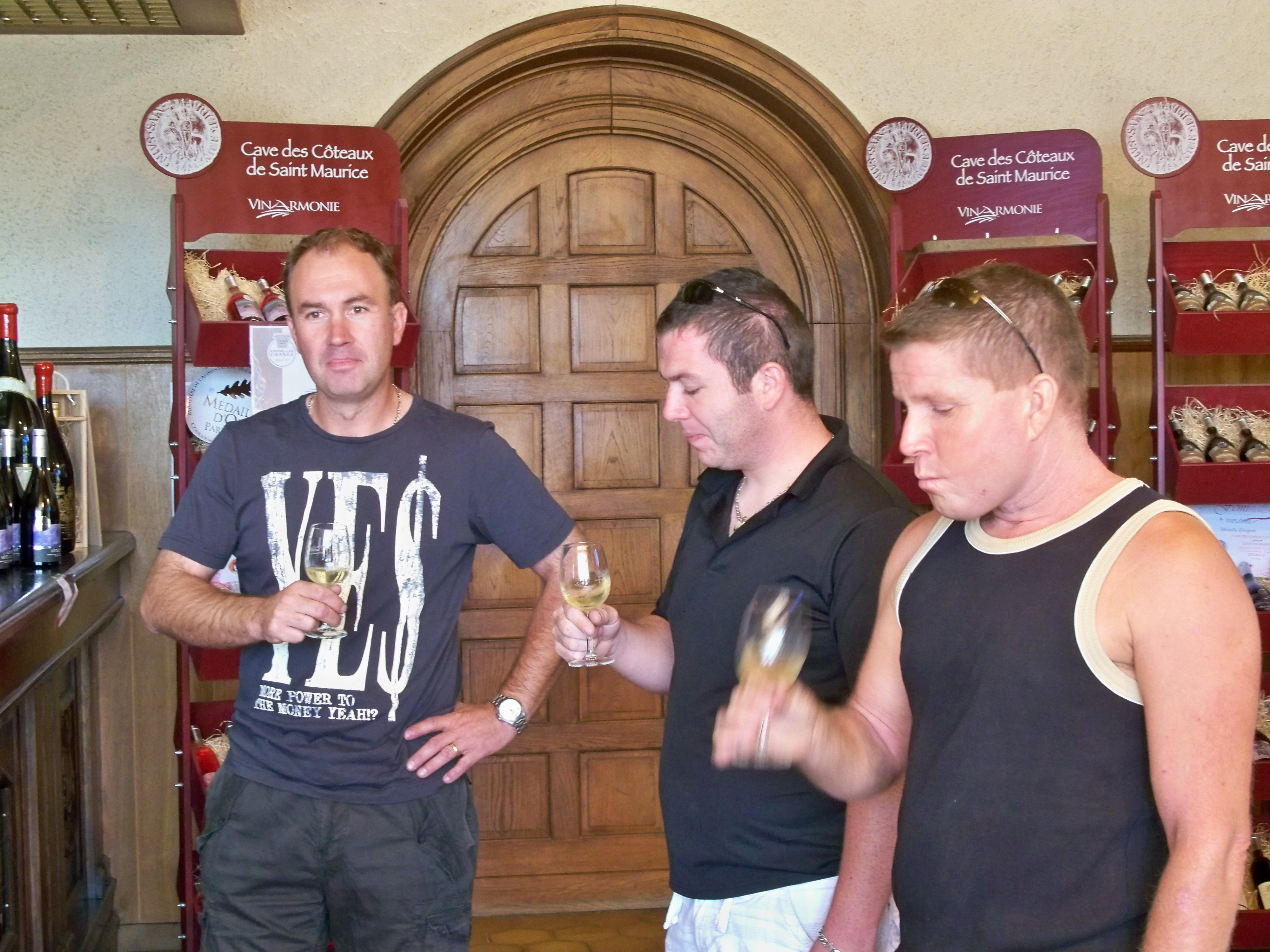 Dégustation en cave à Saint Maurice sur Eygues, Drôme, France